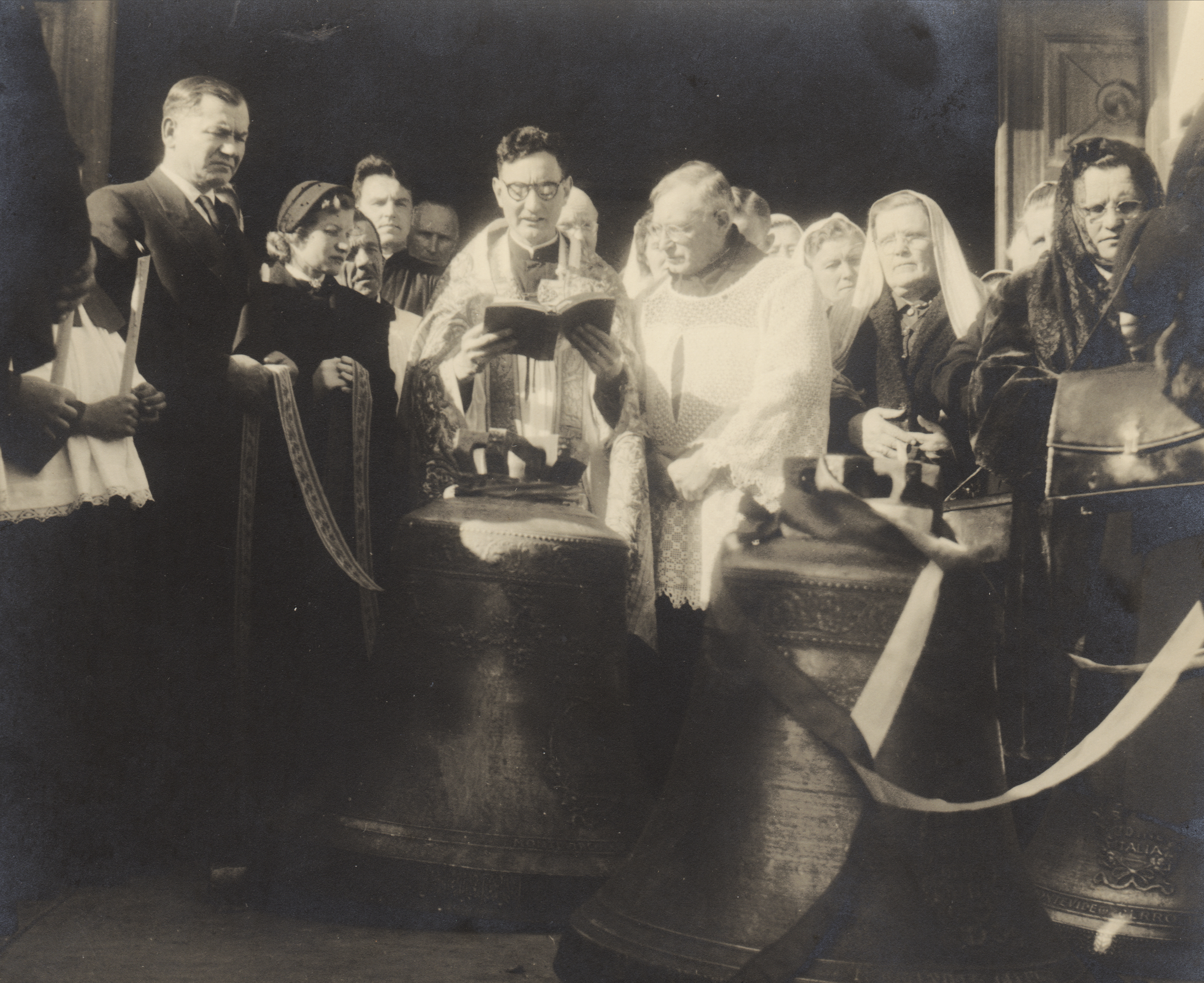 Montevideo Fatimos Nekalčiausios Mergelės Marijos Širdies varpų šventinimo ceremonija